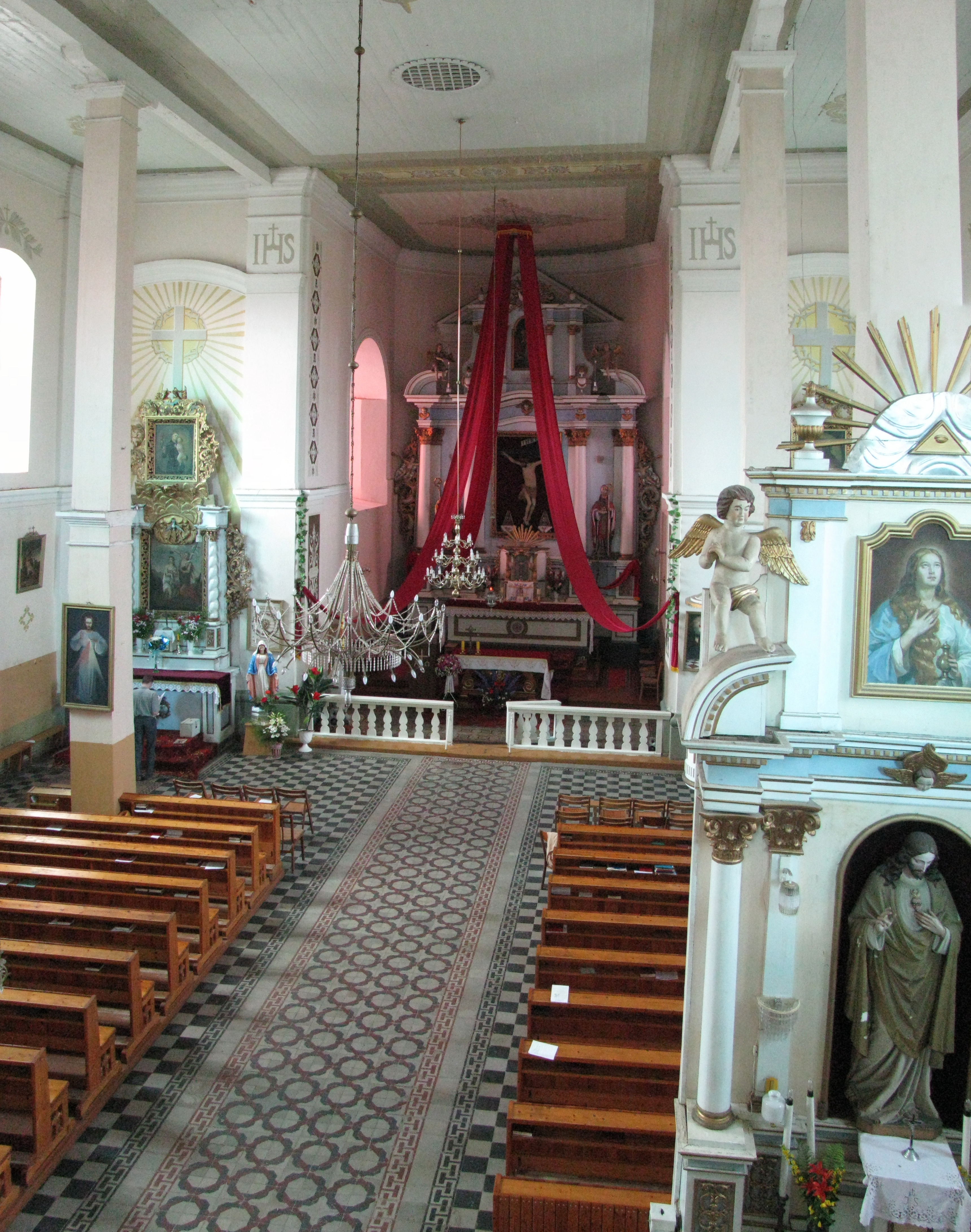 Беларуская (тарашкевіца): Касьцёл Яна Хрысьціцелябакавыя алтары. в. Ваўкалата This is a photo of Belarusian heritage monument. Reference number: 212Г000432 ( WLM)